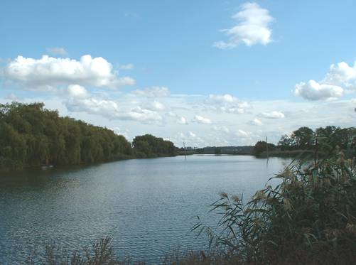 Река Какайка (приток р.Кирпили) в районе станицы Платнировской